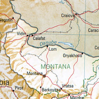 Lom - Lage des Ortes in Bulgarien